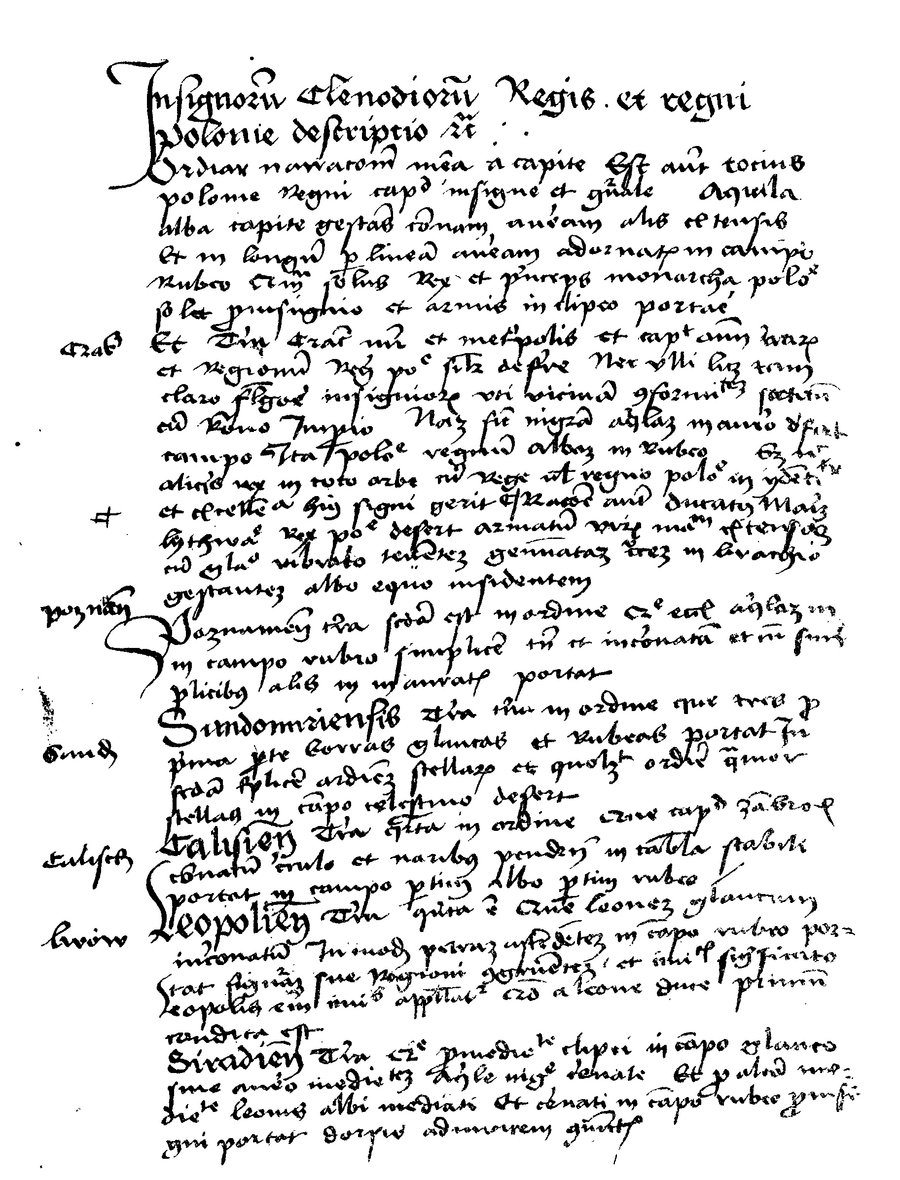 Zygmunt Celichowski,"Insignia seu clenodia regis et regni Poloniae. Z kodeksu kórnickiego", wyd. Z. Celichowski, Poznań 1885